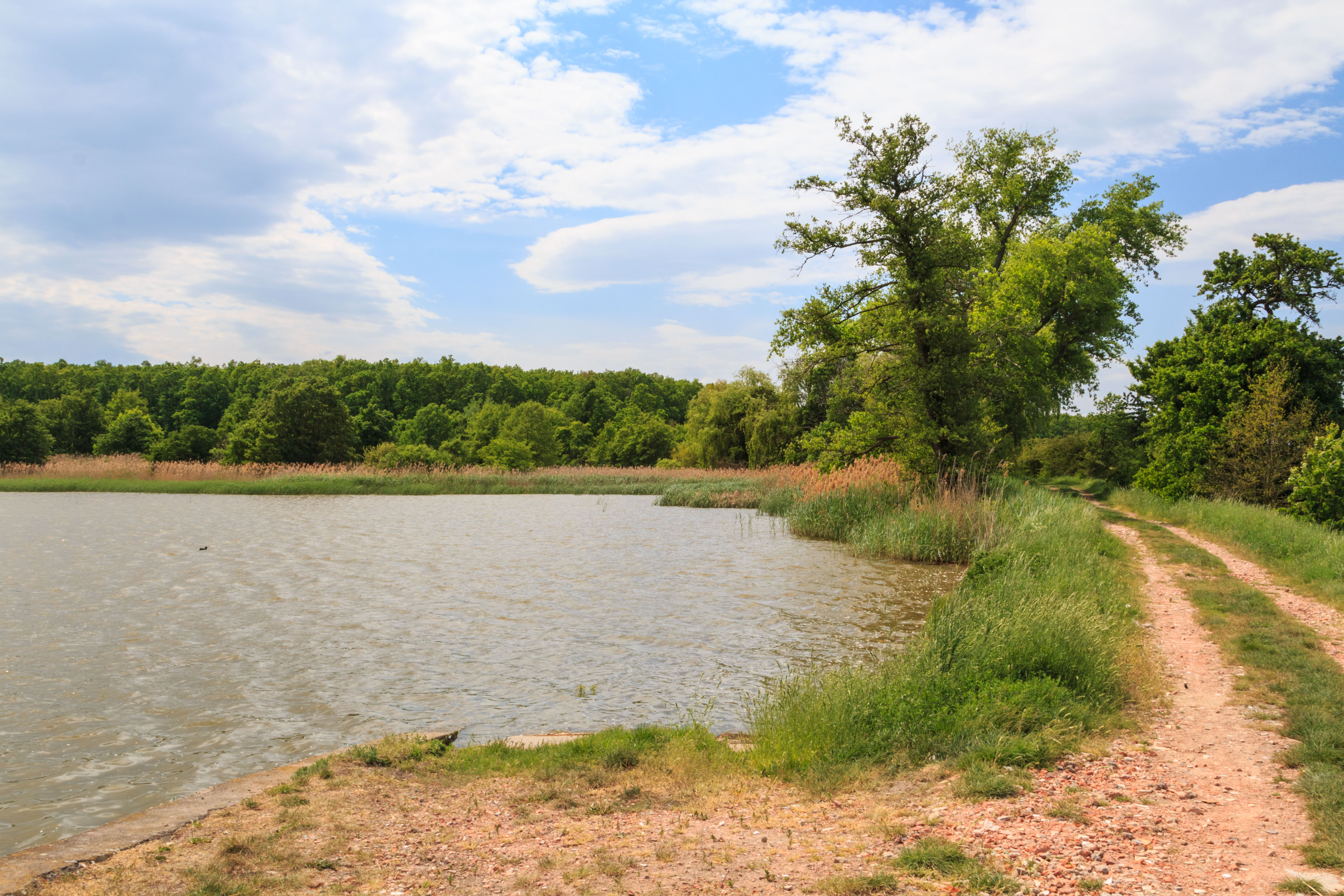 Rybník Šmatlán v PR Žernov Project: Vodstvo.